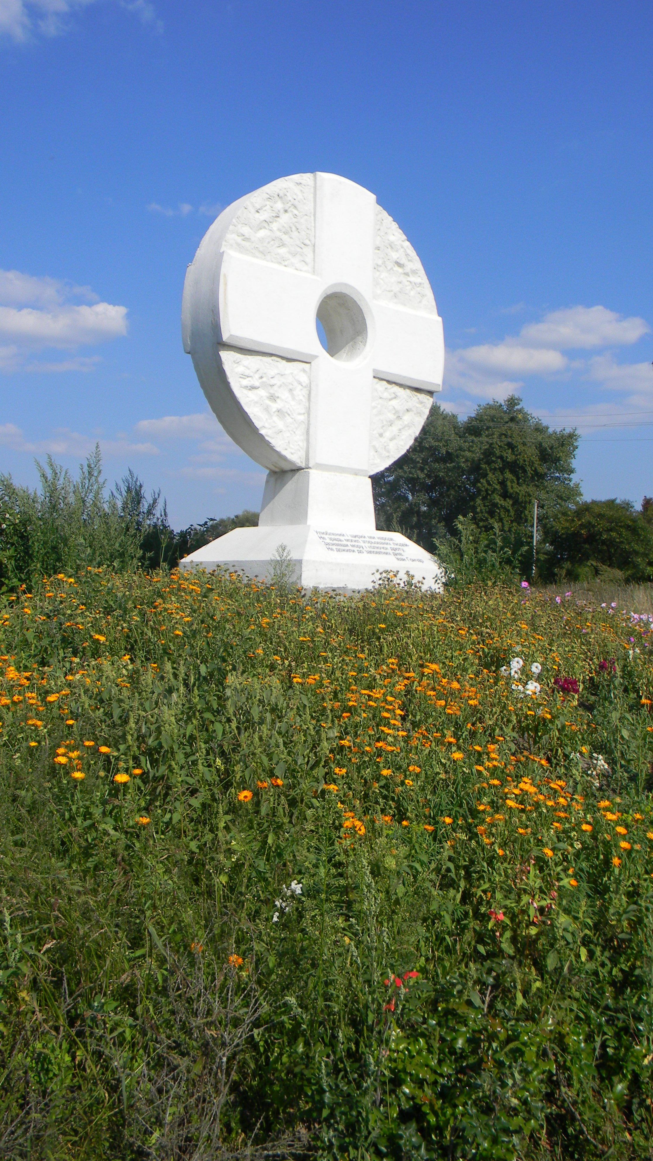 Пам'ятник жертвам Голодомору в Андріївці